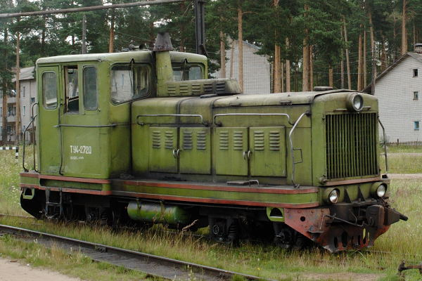 TU4-2720